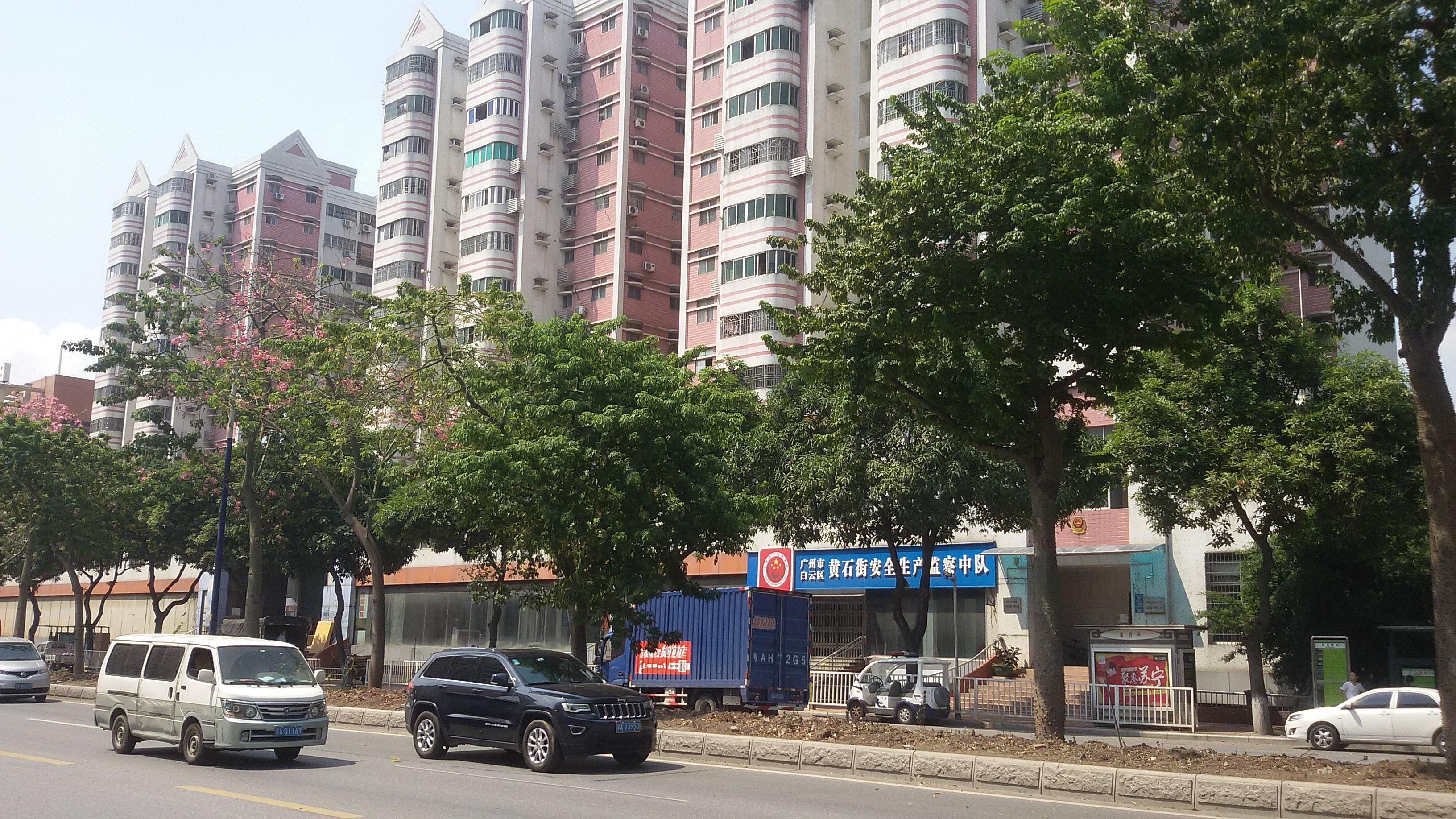 粵語: 白雲區黃石花園